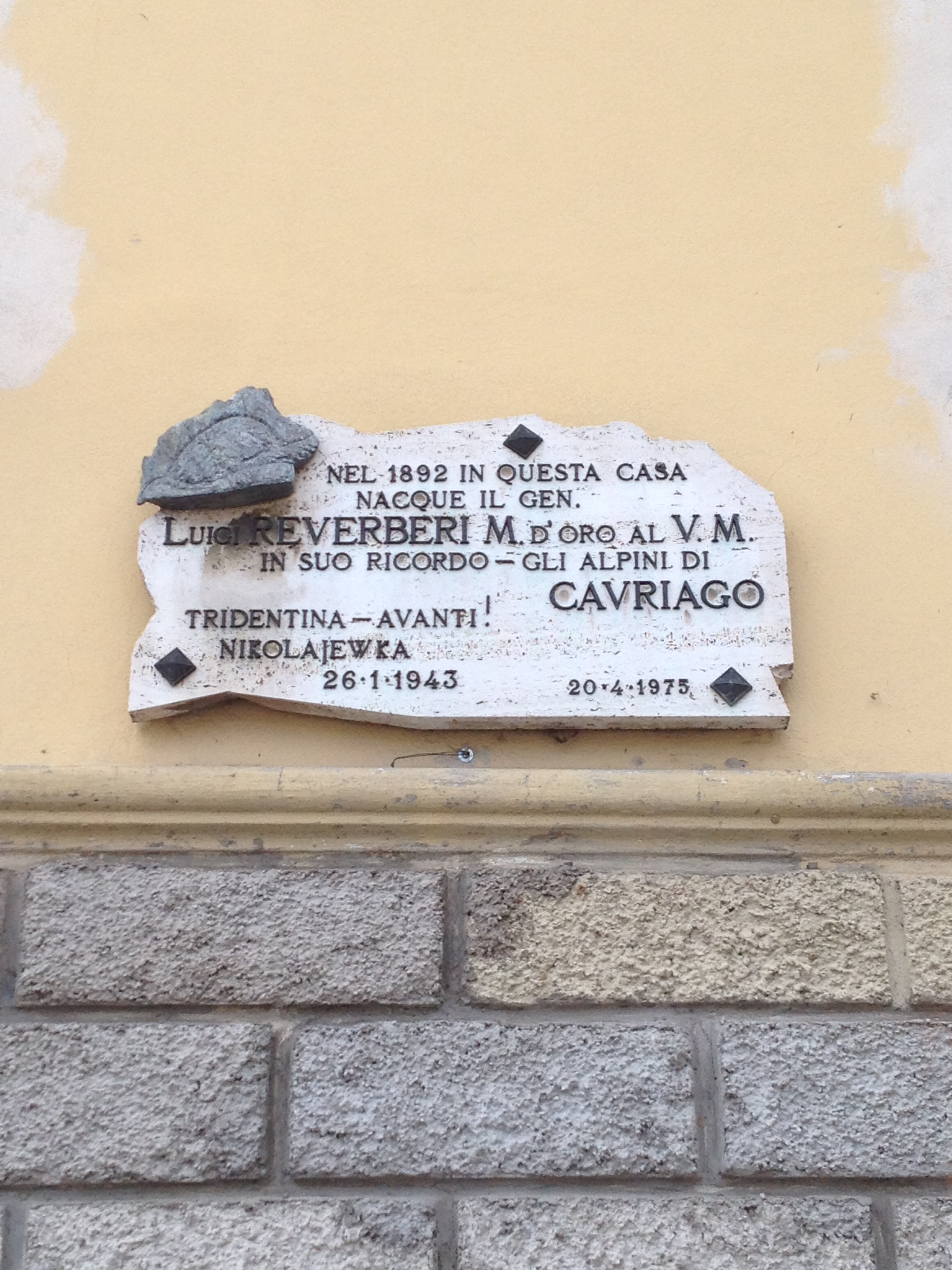 Lapide in omaggio al Gen. Luigi Reverberi sulla sua casa natale in piazza Zanti a Cavriago, provincia di Reggio nell'Emilia.